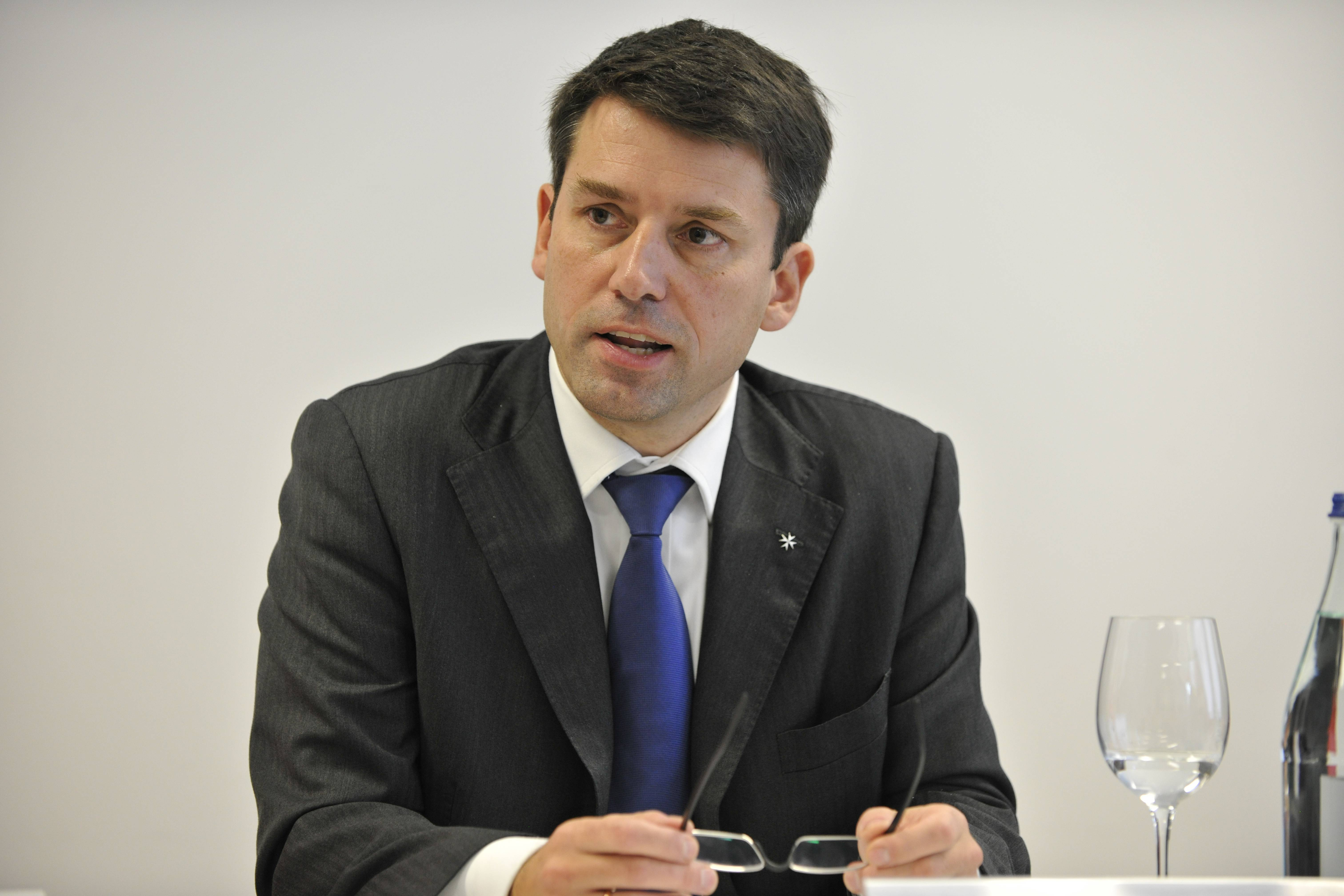 Abschlusspressekonferenz: 9. Oktober 2013, 12:45-13:15 Gottfried Locher, Präsident des Rates des Schweizerischen Evangelischen Kirchenbundes SEK